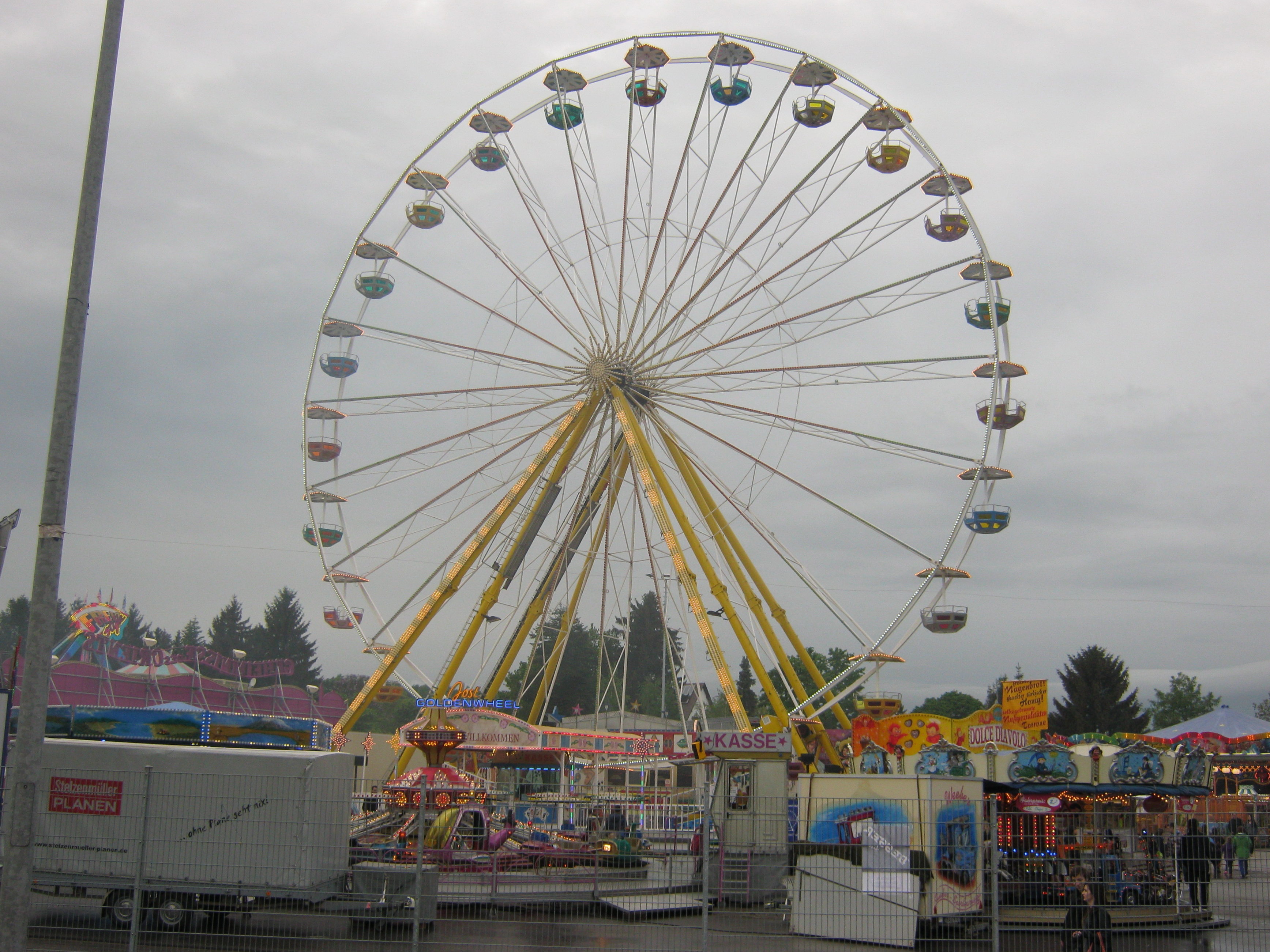 Riesenrad ( Golden Wheel) auf dem Maientag 2013 in Vaihingen an der Enz